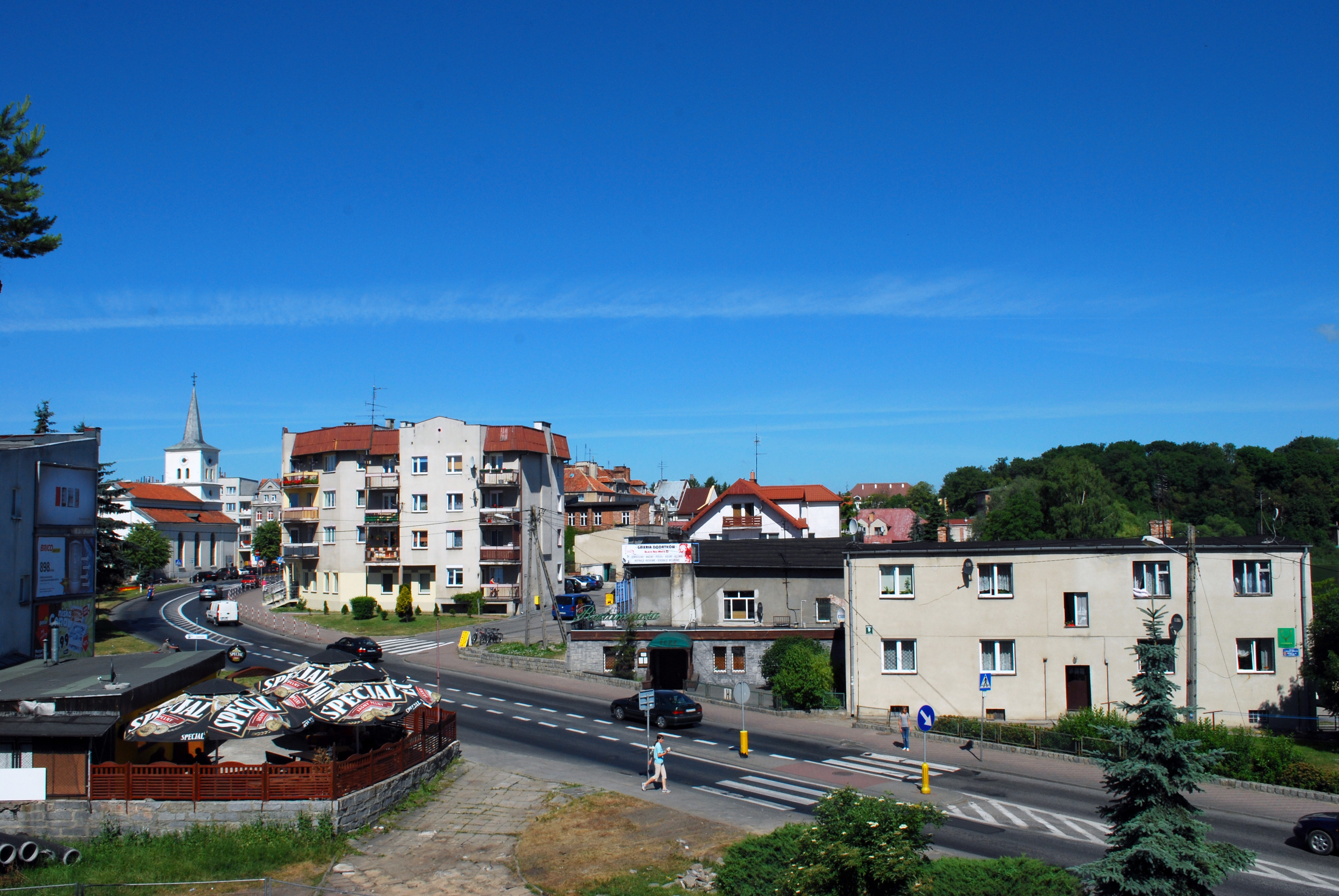 Widok z zamku na Sztum.